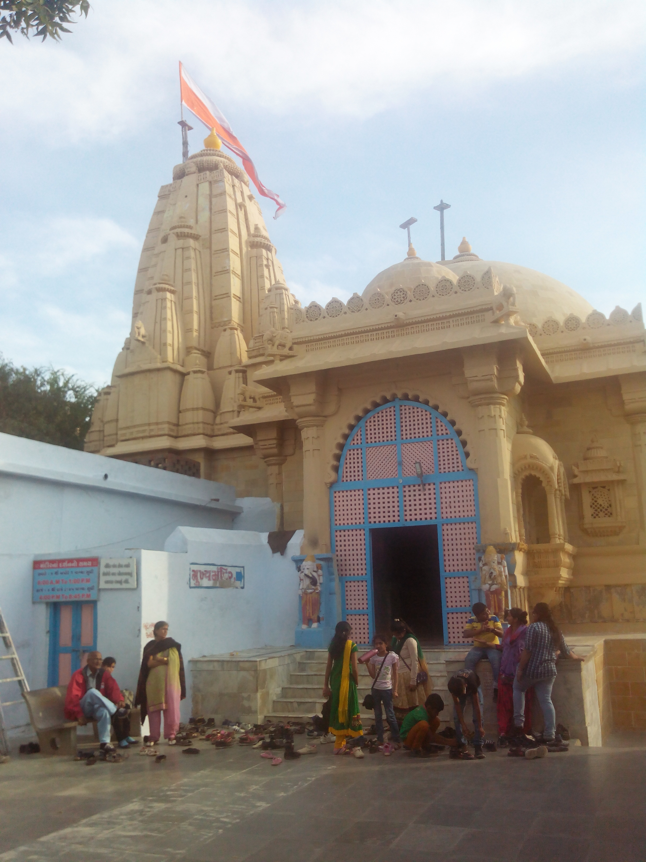 Narayan Sarovar temple